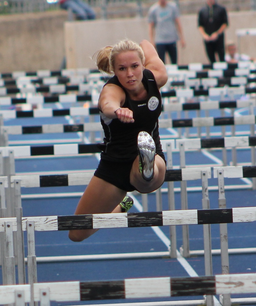 Mathilde Heltbech under finaleløbet i 100 m hæk ved de Danske Mesterskaber 2012